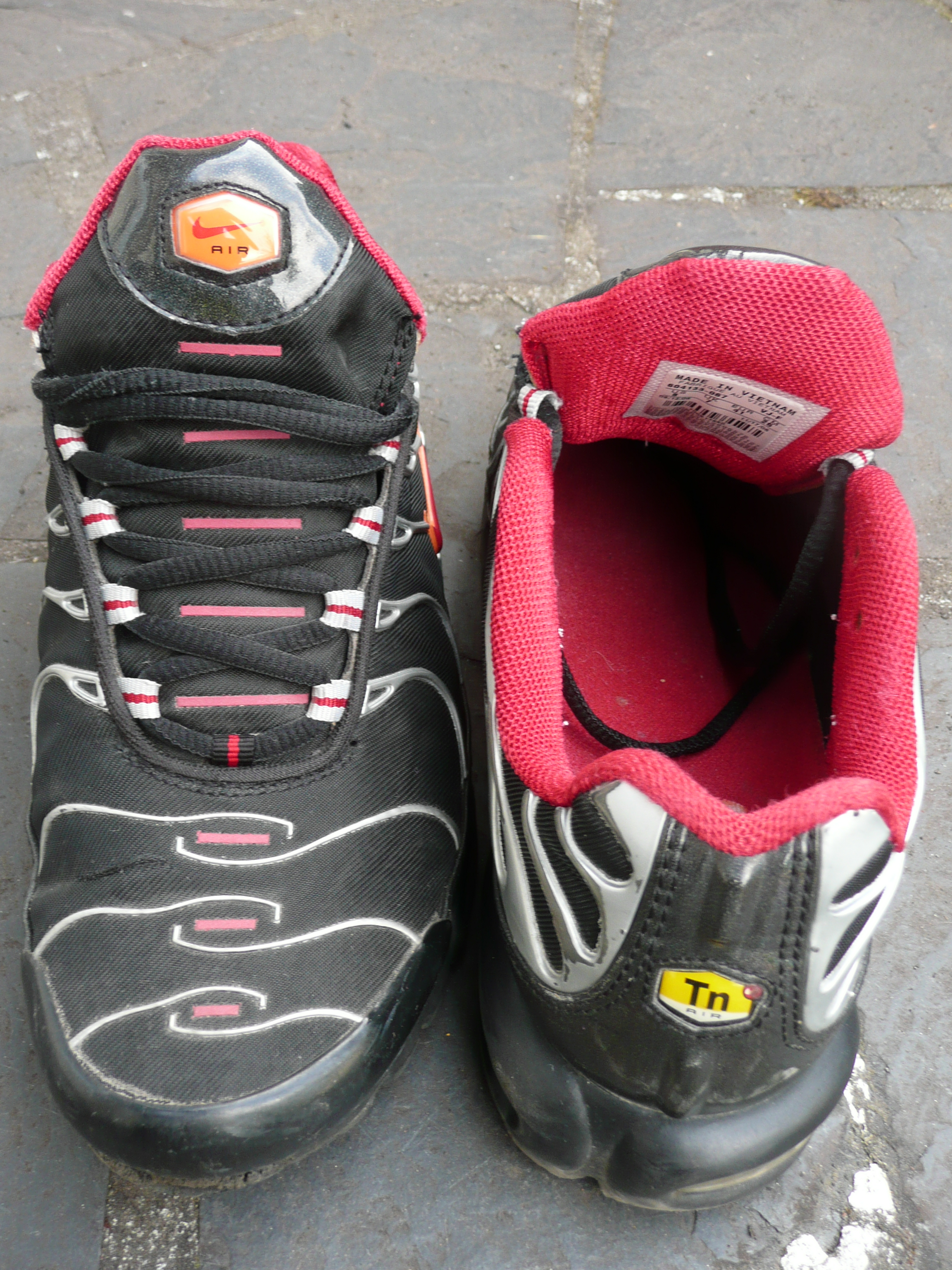 aspect de la Tn